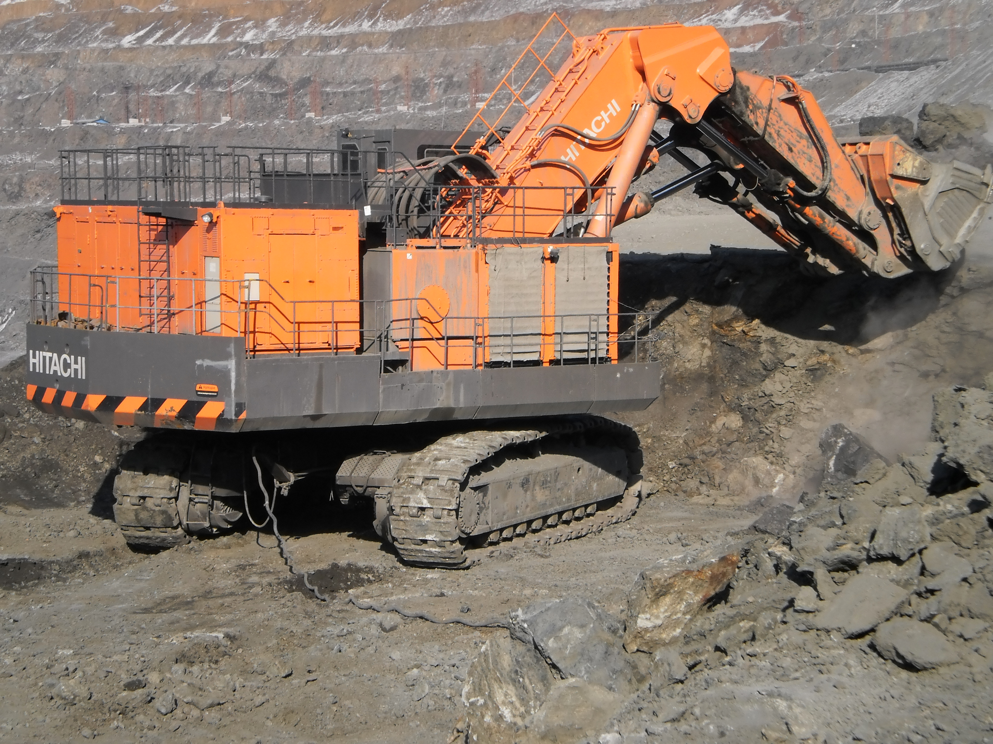 Экскаватор.